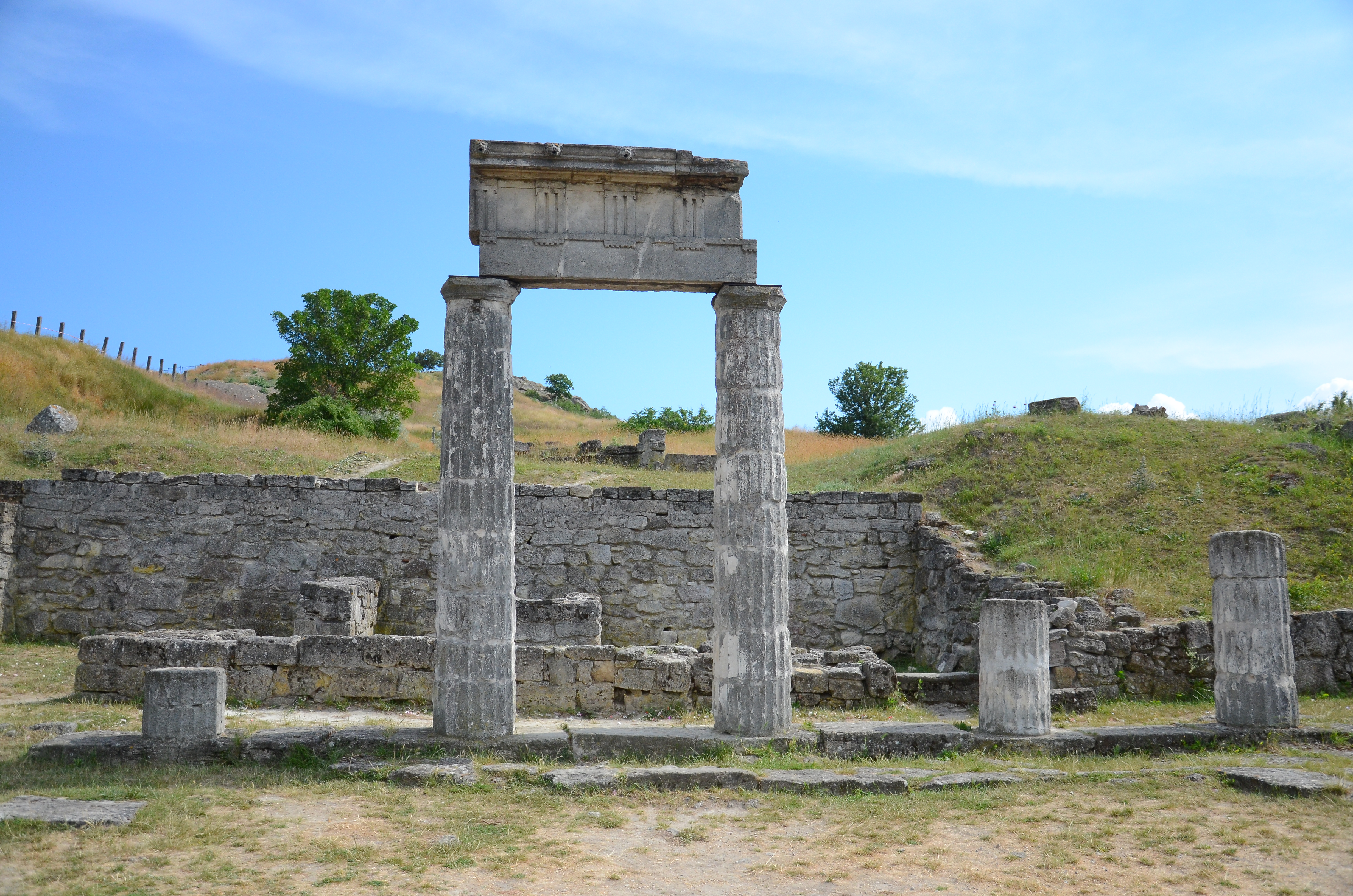 Пантикапей